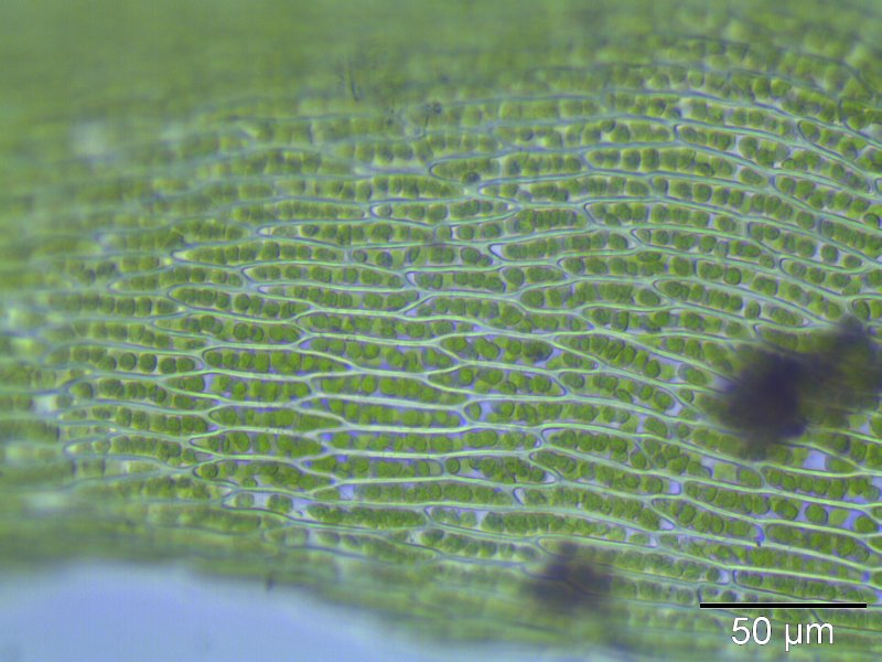 Verschiedenblättriges Schönschnabelmoos (Eurhynchium praelongum), Laminazellen, 400x Vergrößerung, Rostock